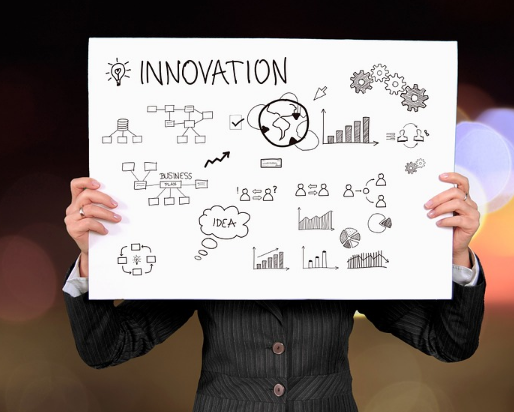 IMG sobre innovació